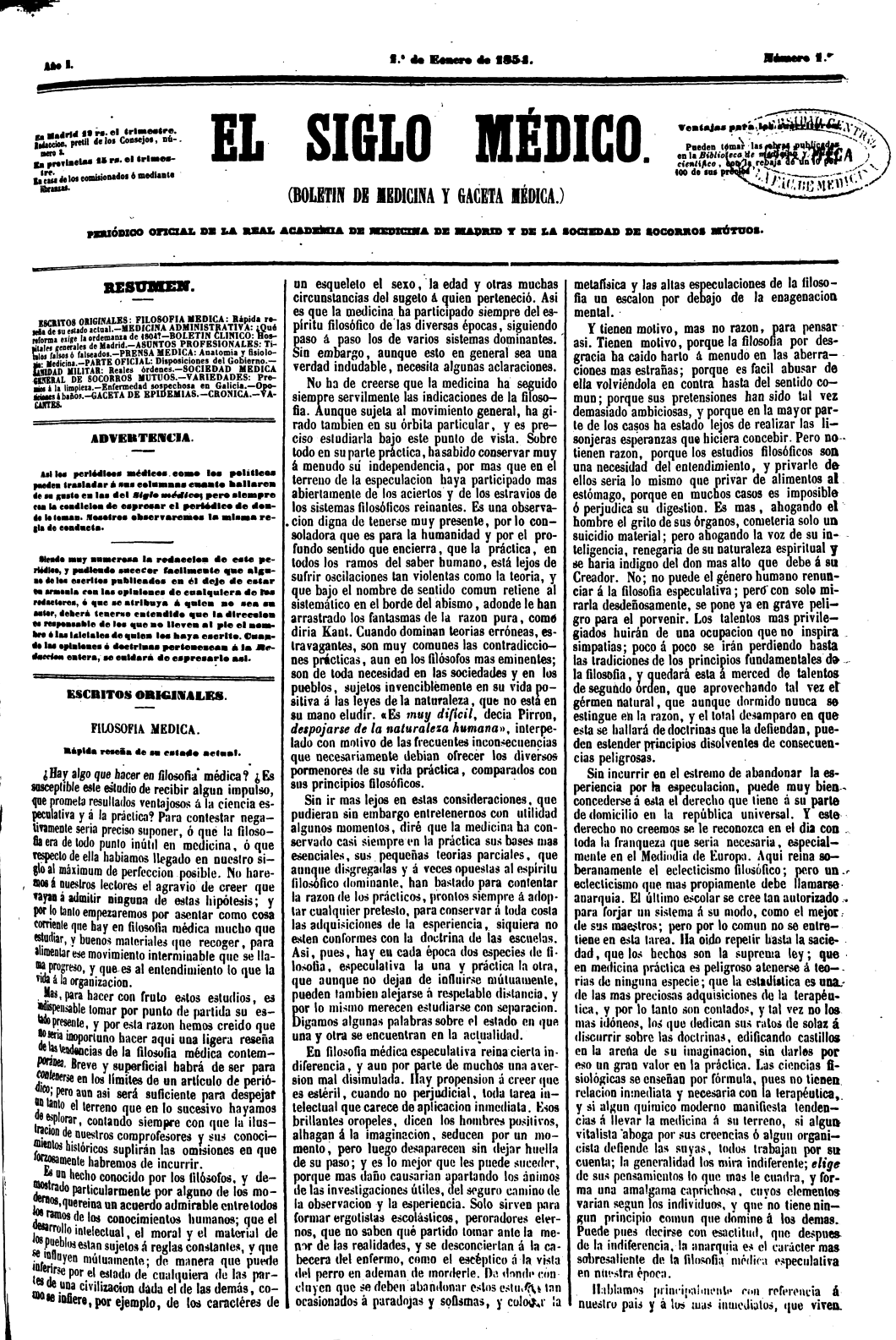 Primera página del primer número de El Siglo Médico.